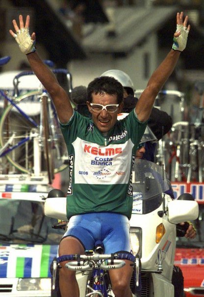 Giro de Italia - Passo del Tonale '97